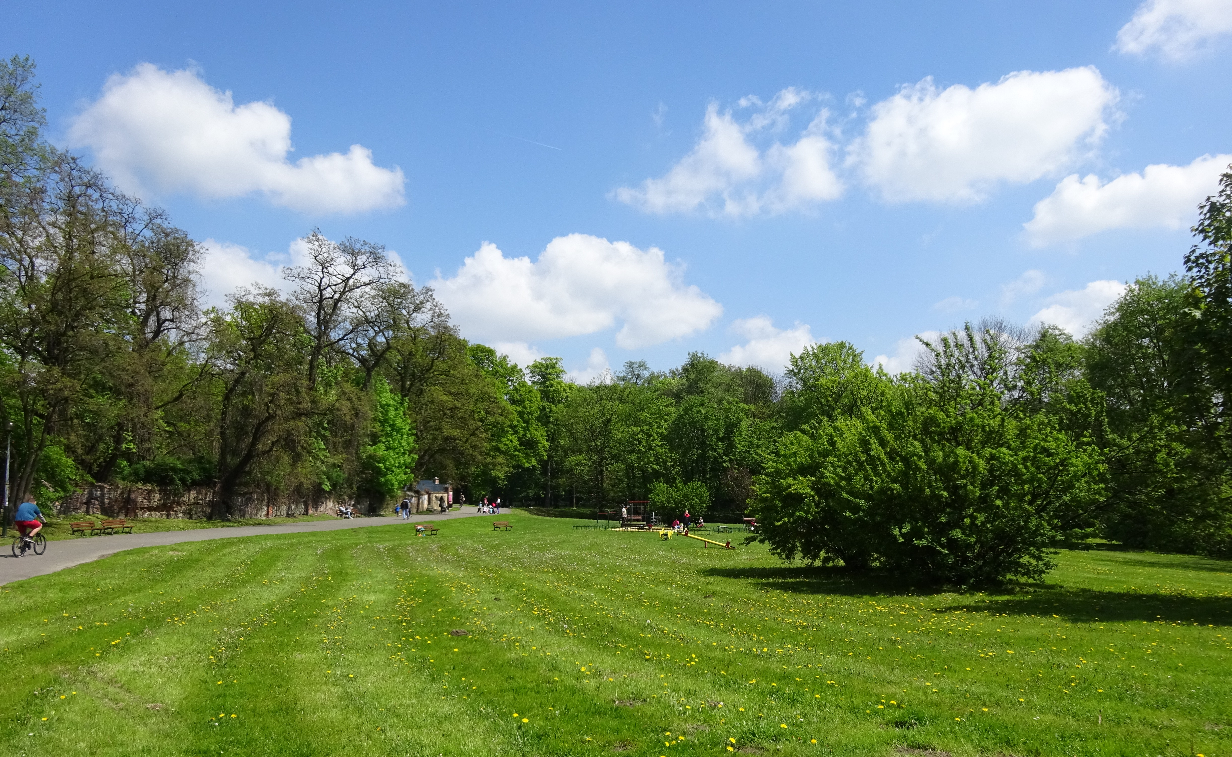 Park im. Anny i Erazma Jerzmanowskich w Krakowie-Prokocimiu. Widok południowej części z rozległą łąką od strony ul. Wielickiej. 2017